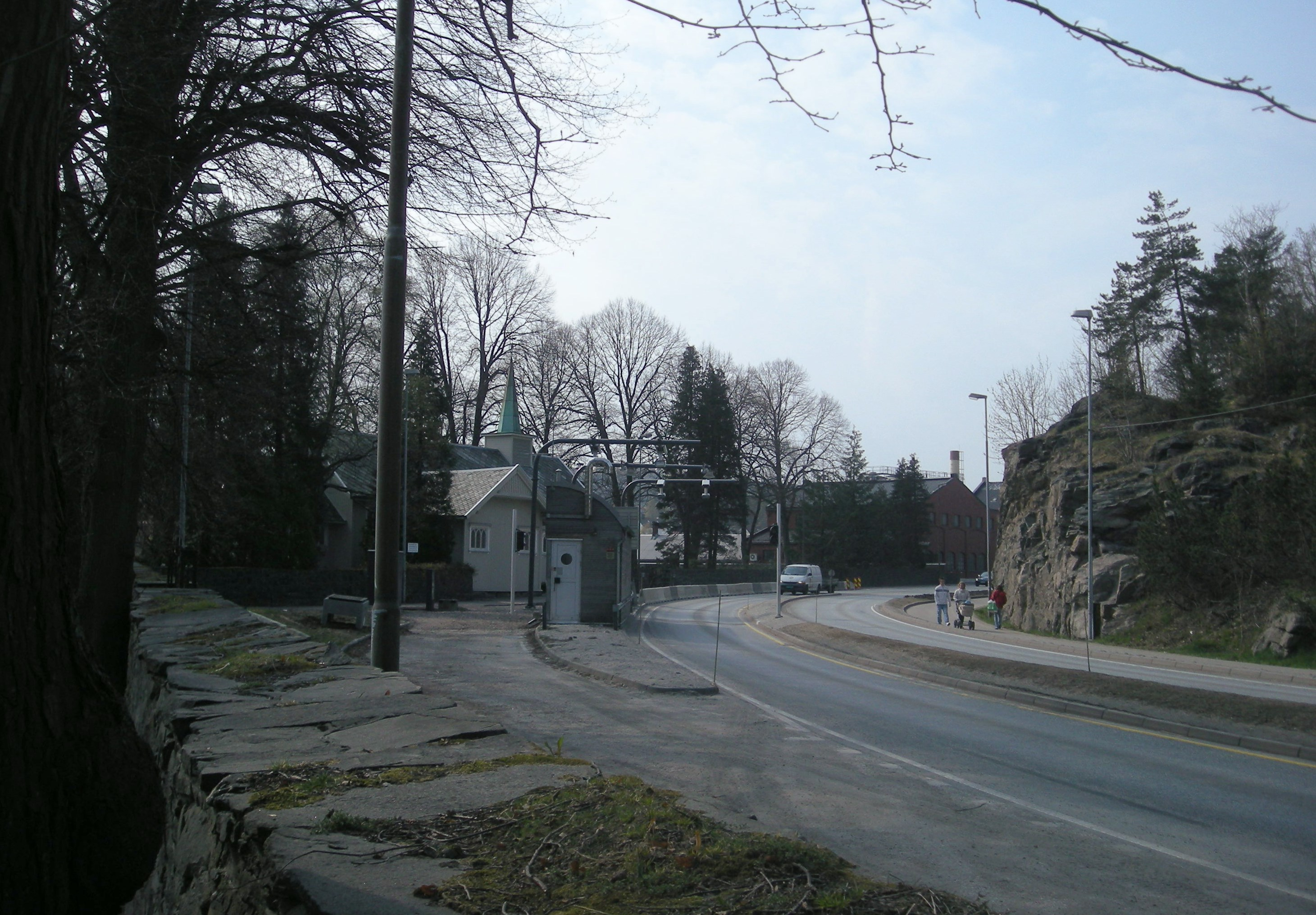 Riksvei 9 forbi bomstasjonen like ved kirkegården